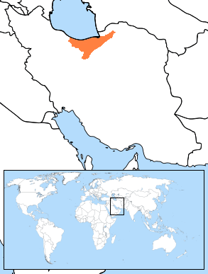 Mazandarani Language Map